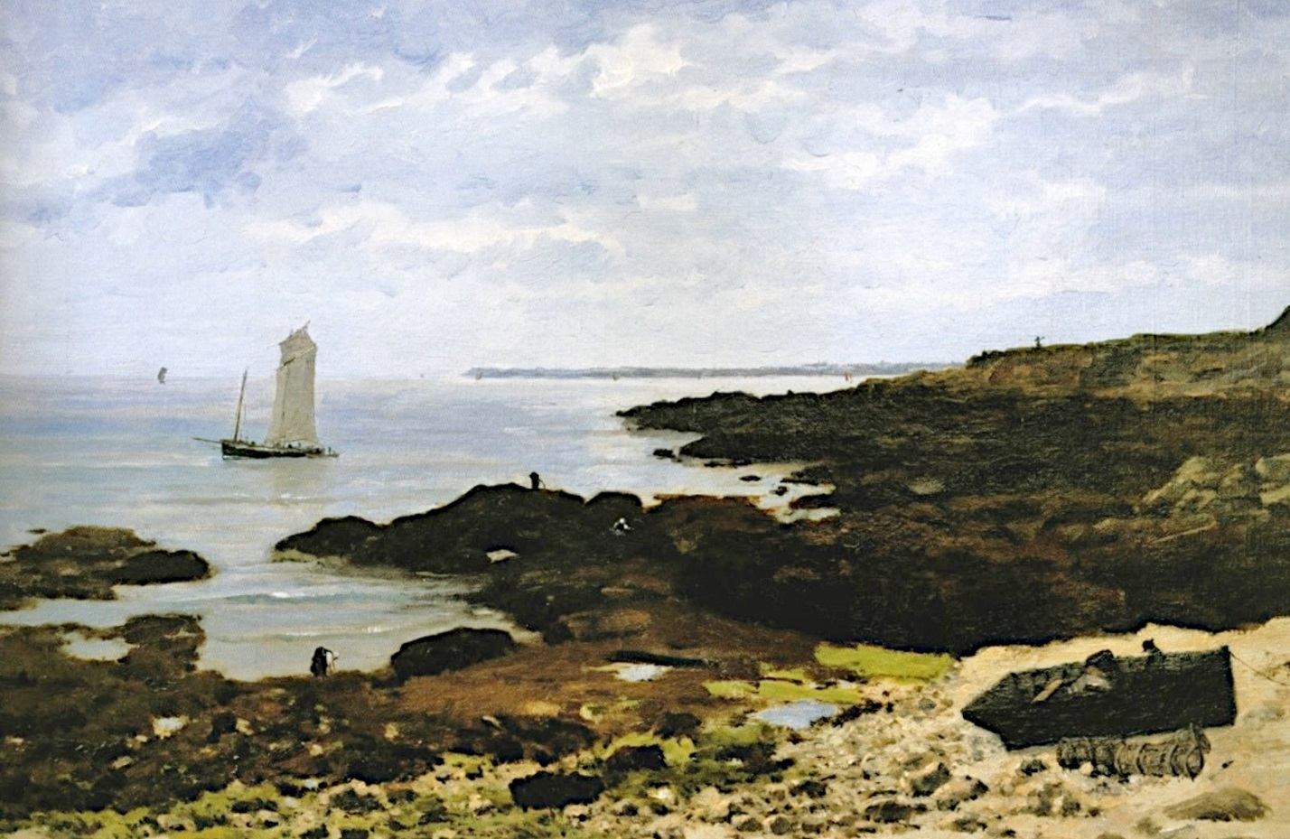 Élodie La Villette (1848-1917) : Larmor-Plage (1879)